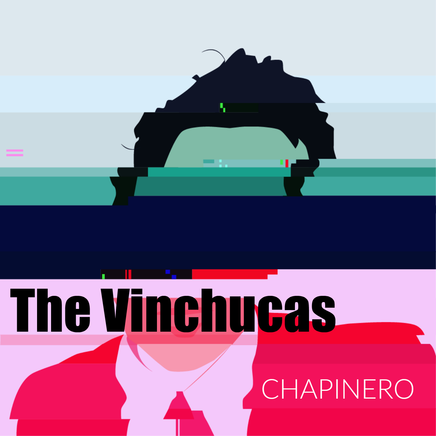 Cover del EP Chapinero del grupo berlinés "The Vinchucas".